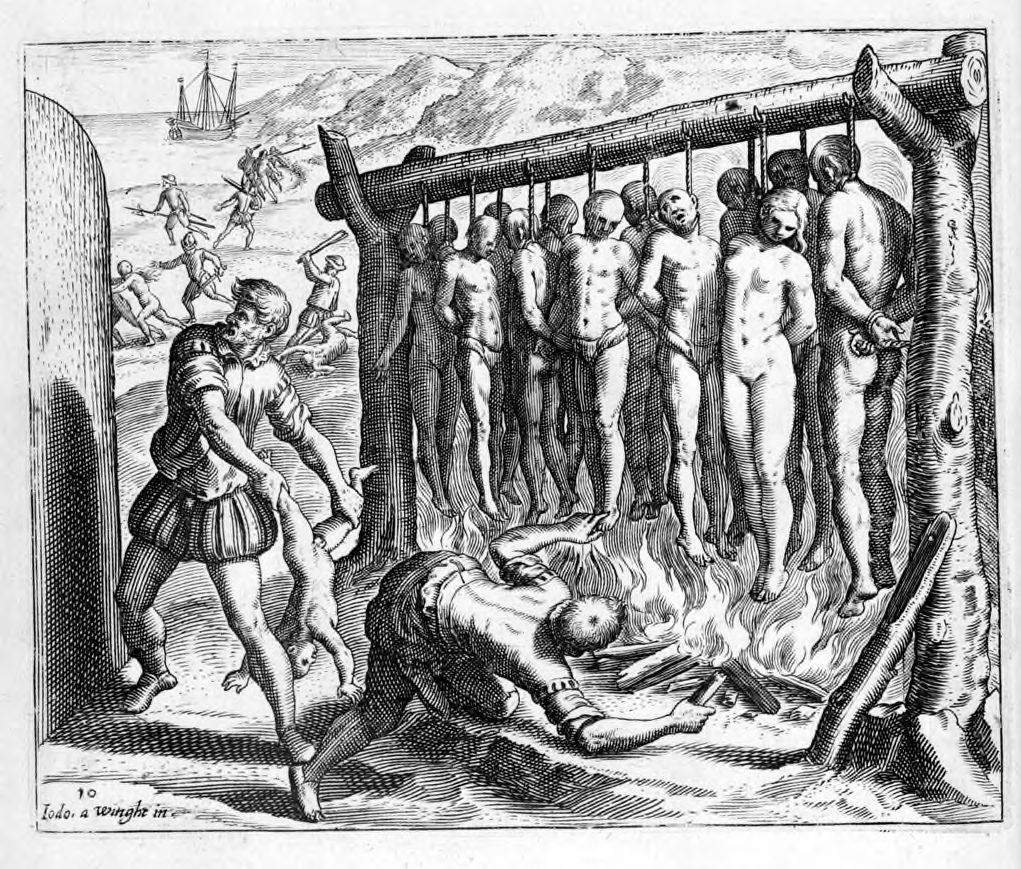 Ilustración de la Brevísima de De las Casas, realizada por De Bry